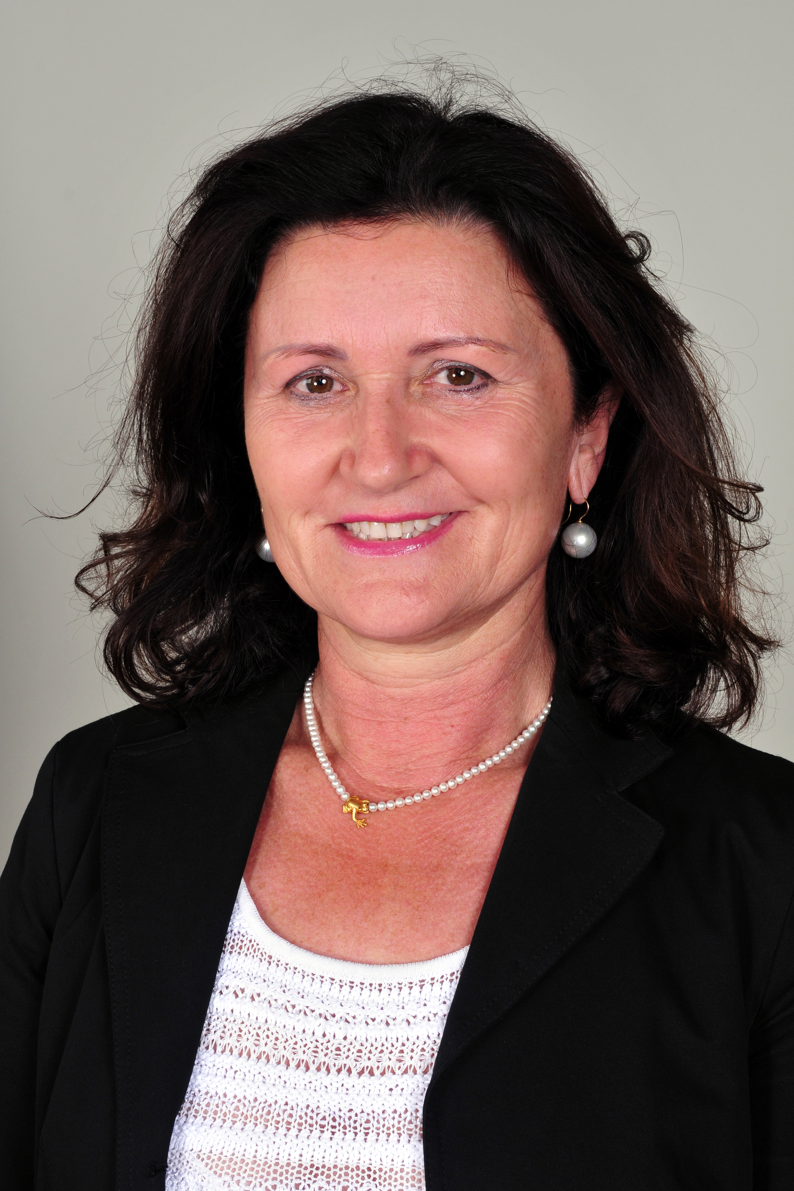 Landtagsprojekt Bayern The making of this work was supported by Wikimedia Austria. For other files made with the support of Wikimedia Austria, please see the category Supported by Wikimedia Österreich. Wikipedia im Landtag – Bayern 17. bis 19. Juli 2012 in MünchenDieses Foto wurde im Rahmen des Projektes „Wikipedia im Landtag“ erstellt.